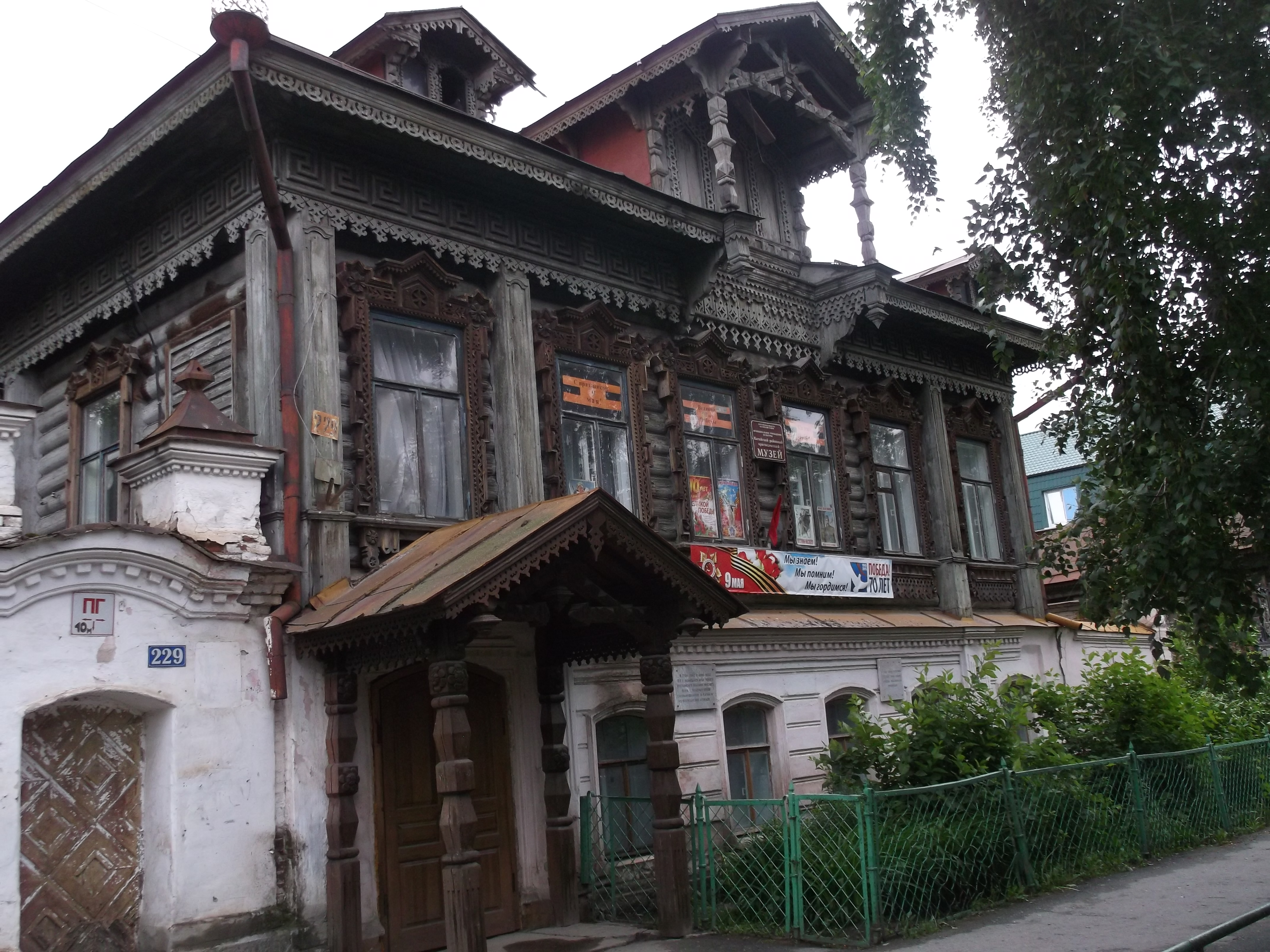 г. Катайск